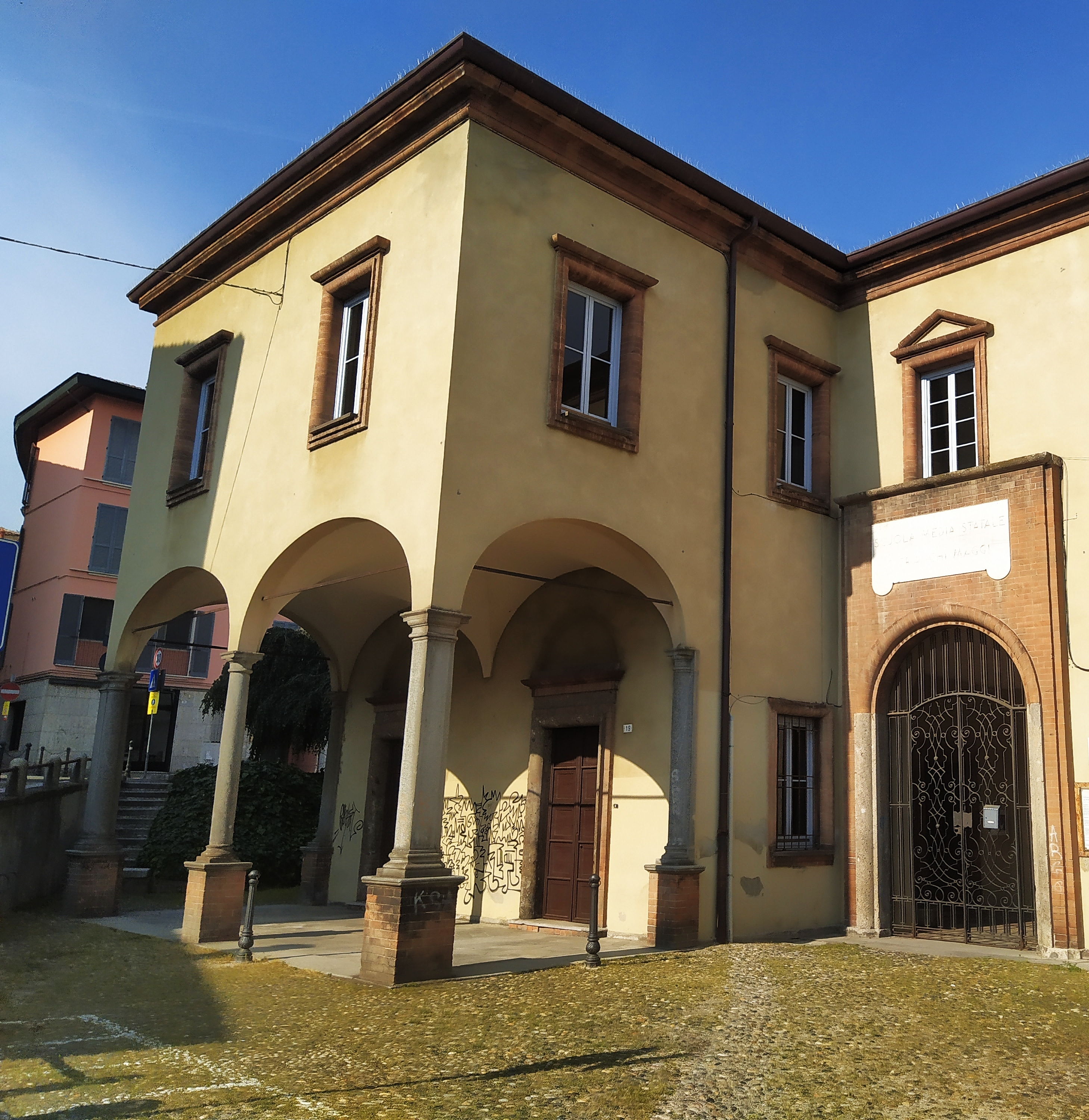 Uno degli ingressi al Monastero di Santa Maria delle Cacce di Pavia